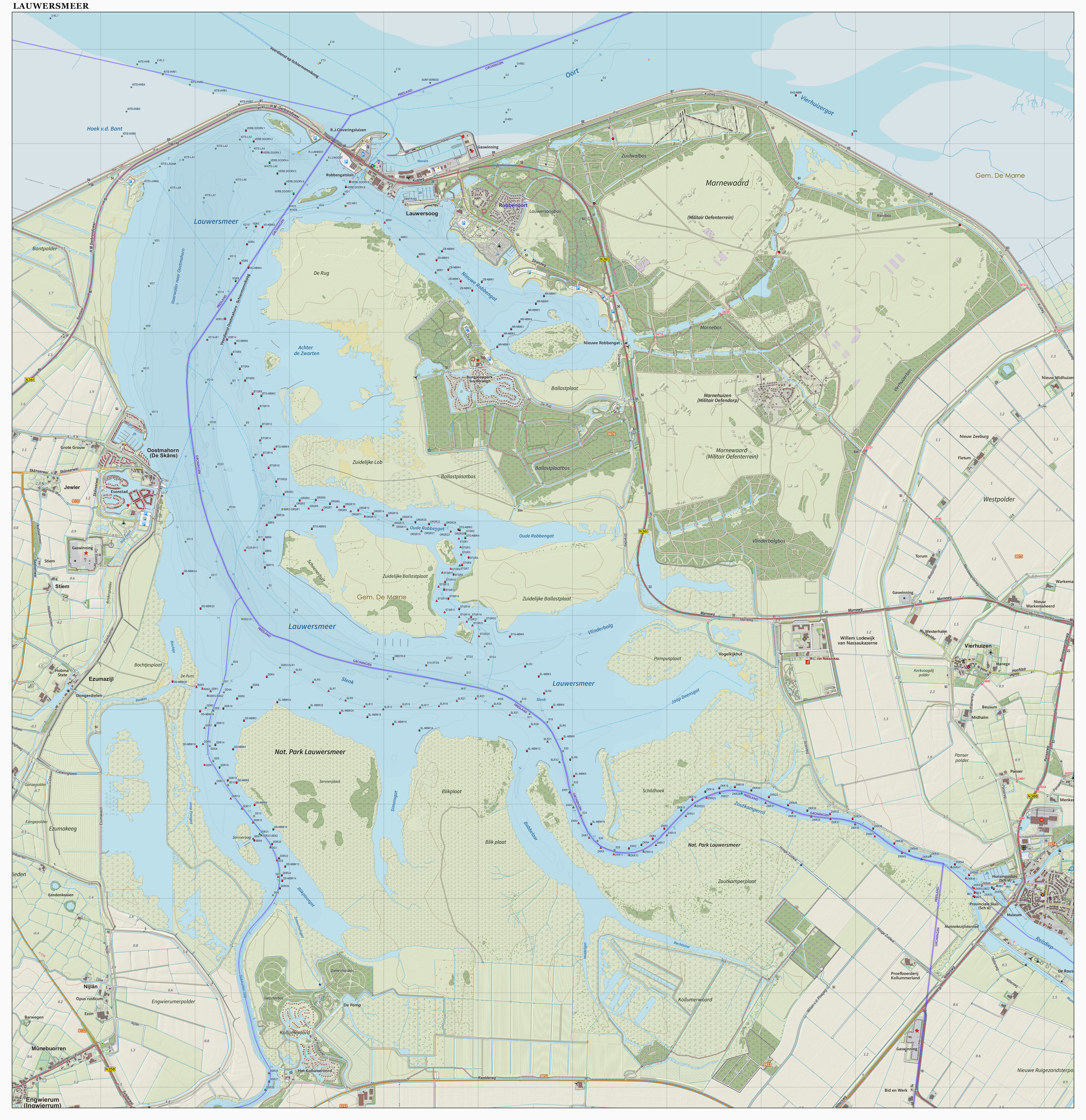 Topografische kaart van het Lauwersmeer (natuurgebied). Resolutie: 400 pixels/km. Samengesteld door Jan-Willem van Aalst op basis van de GML open geodata van de BRT/Top10NL (basisregistratie Topografie, Kadaster), vrijgegeven door Kadaster onder de Creative Commons BY licentie. Additionele gegevens uit BAG uit de Open Street Map en uit de Risicokaart. Zie ook de Legenda.